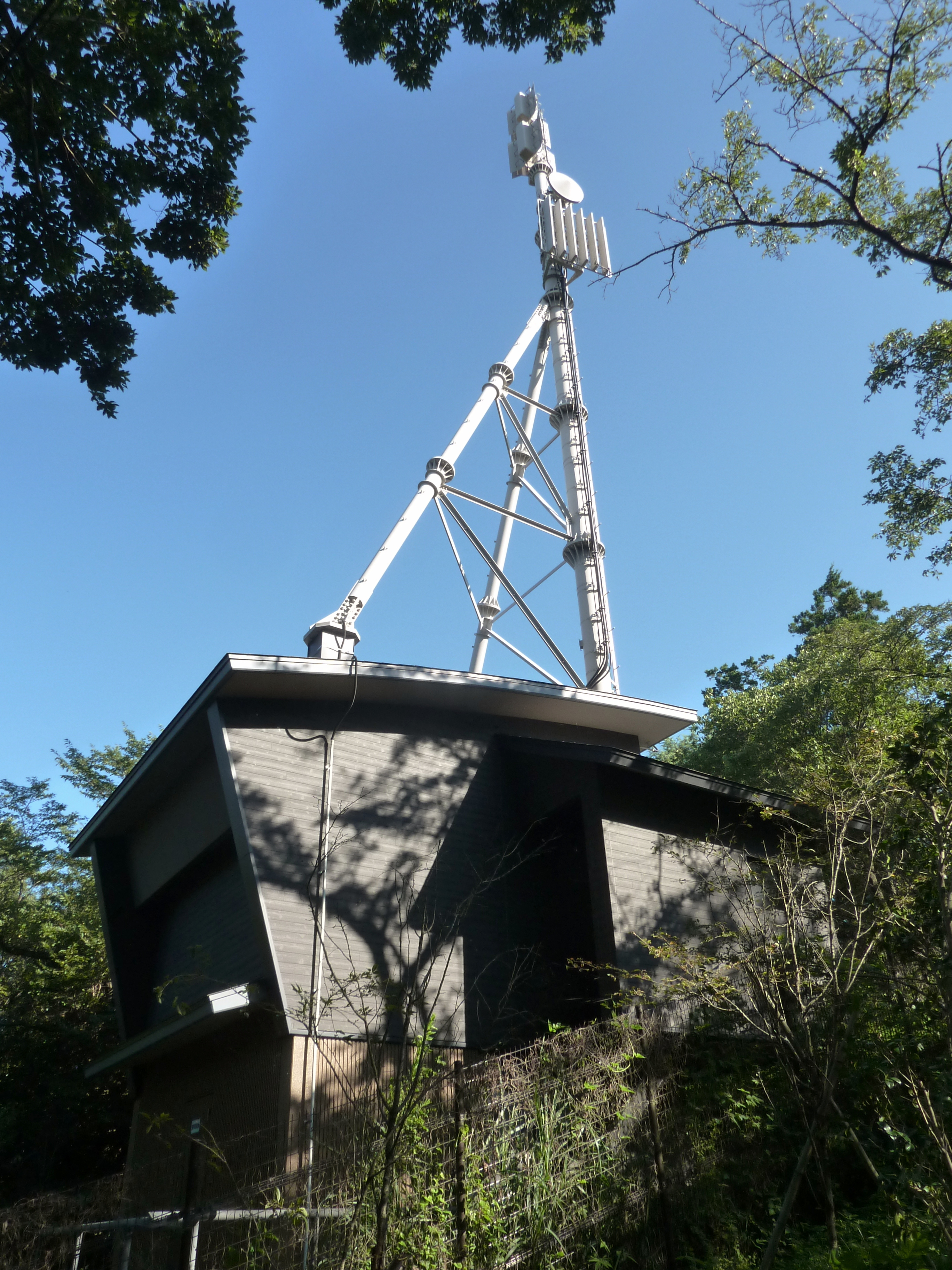 神奈川県秦野市 秦野テレビ中継局